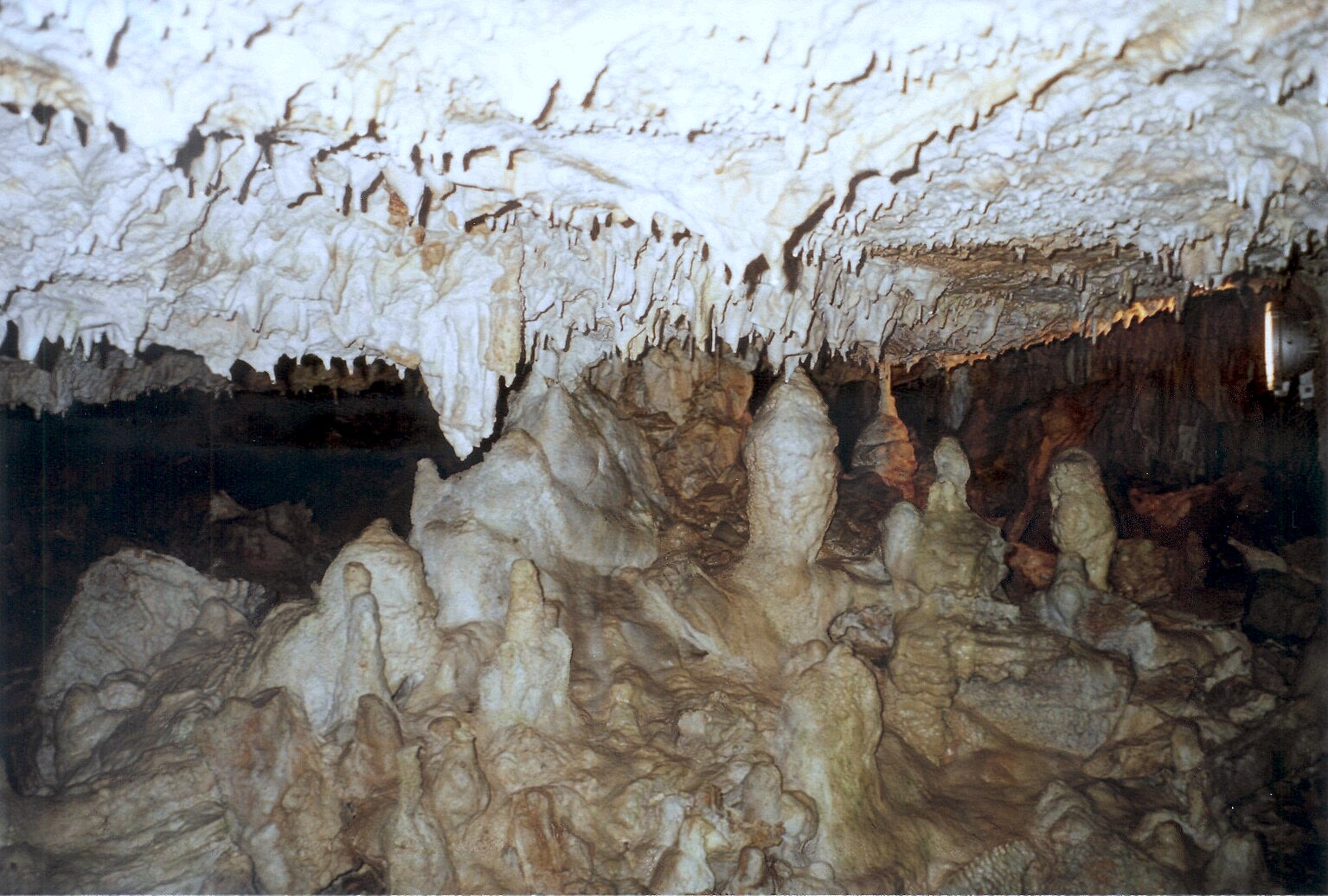 König-Otto-Tropfsteinhöhle, Germany